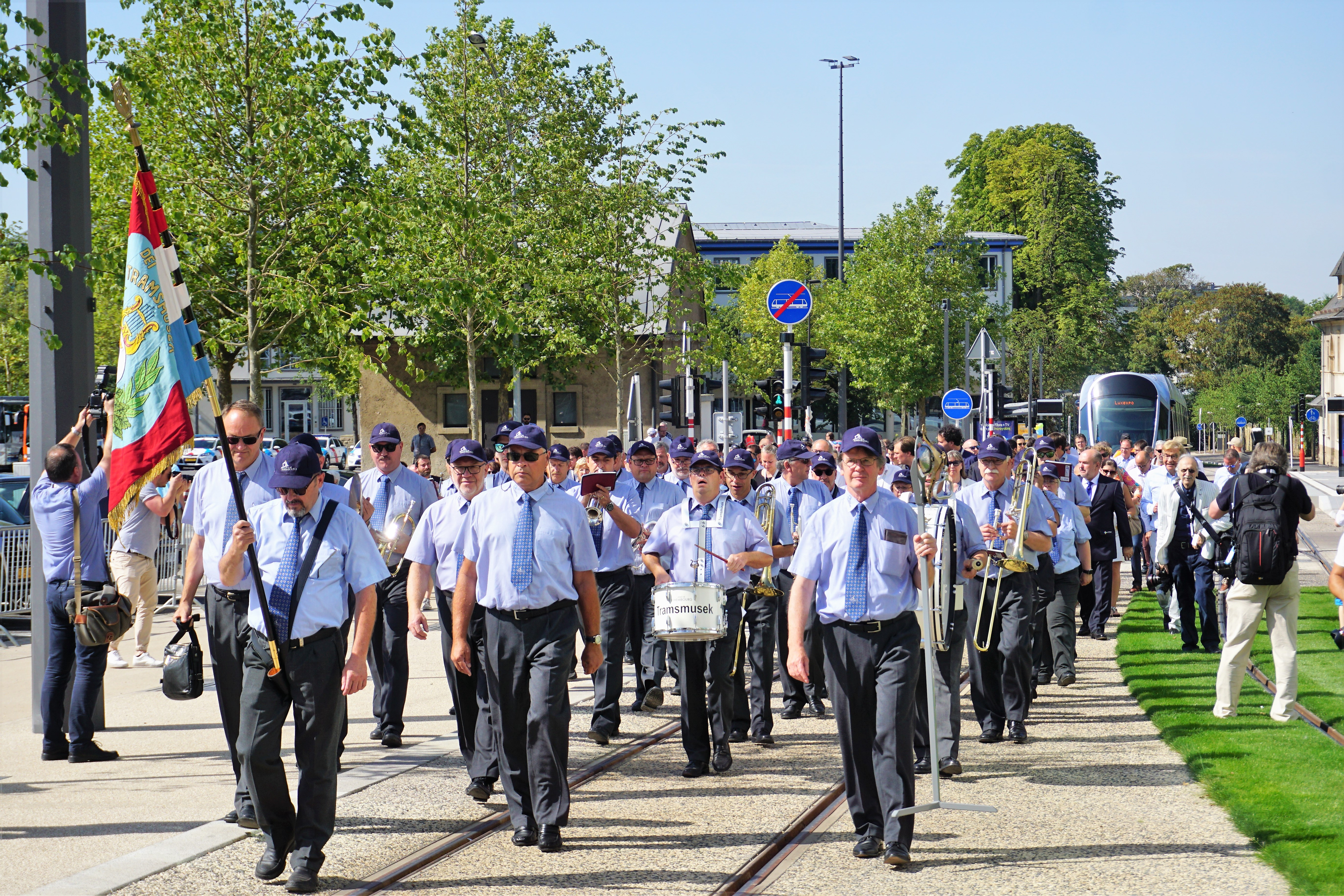 Inauguration de la 2e phase de la ligne de tramway à Luxembourg le 37 juillet 2018. Cortège de la "Tramsmusek" (section de musique des services industiels de la ville de Luxembourg).